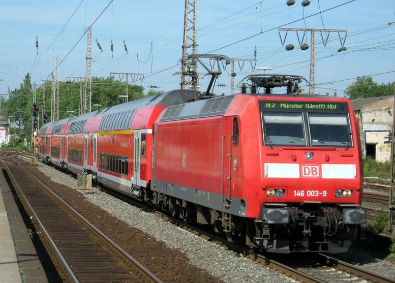 146 003 (Baureihe 146.0 - Bombardier TRAXX) im Einsatz auf dem RegionalExpress 2 (Rhein-Haard-Express)